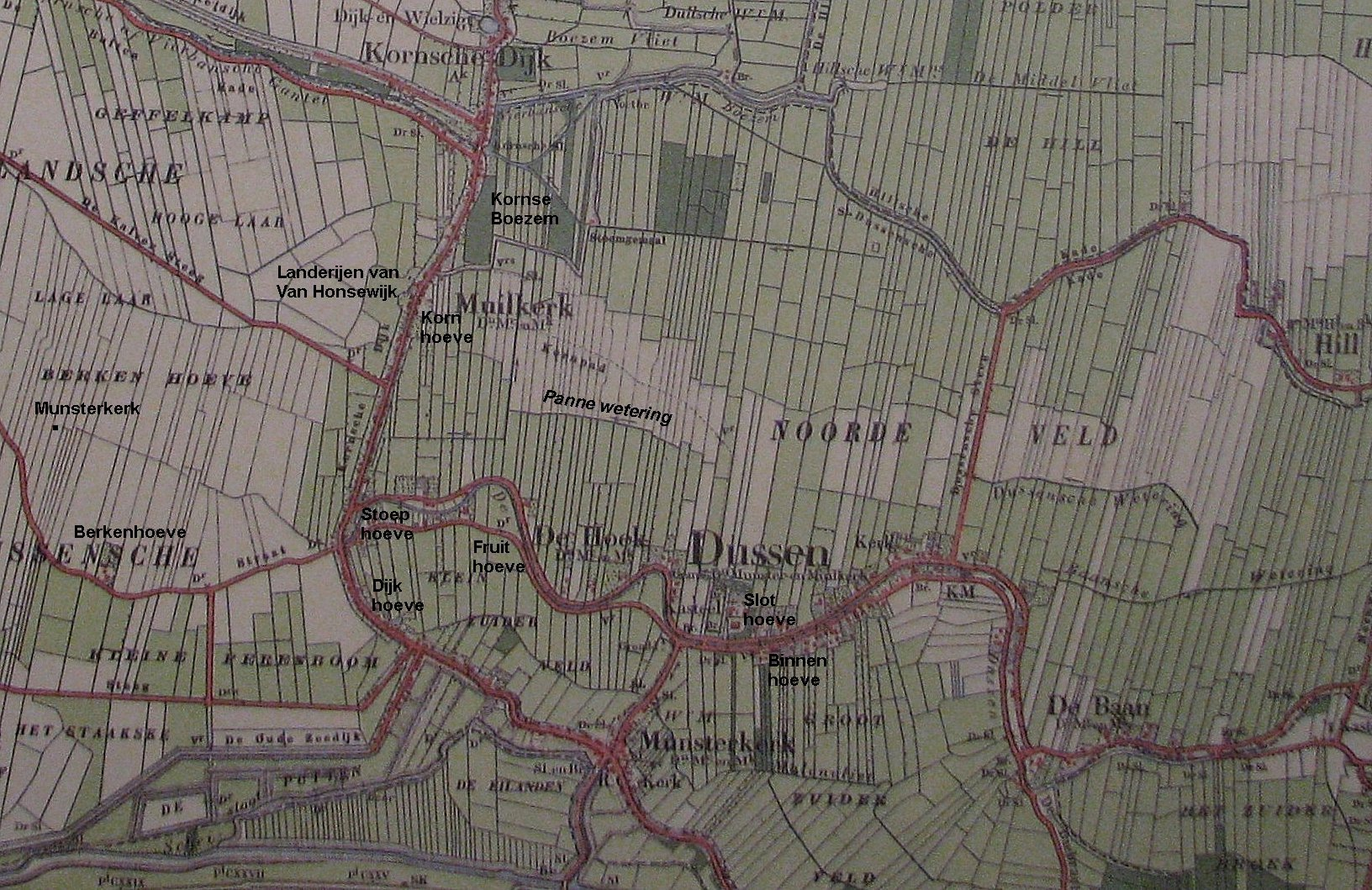 Kaartje van Dussen omstreeks 1905 met daarop aangegeven de belangrijkste eigendommen (land en boerderijen) van het geslacht Van Honsewijk uit Dussen.